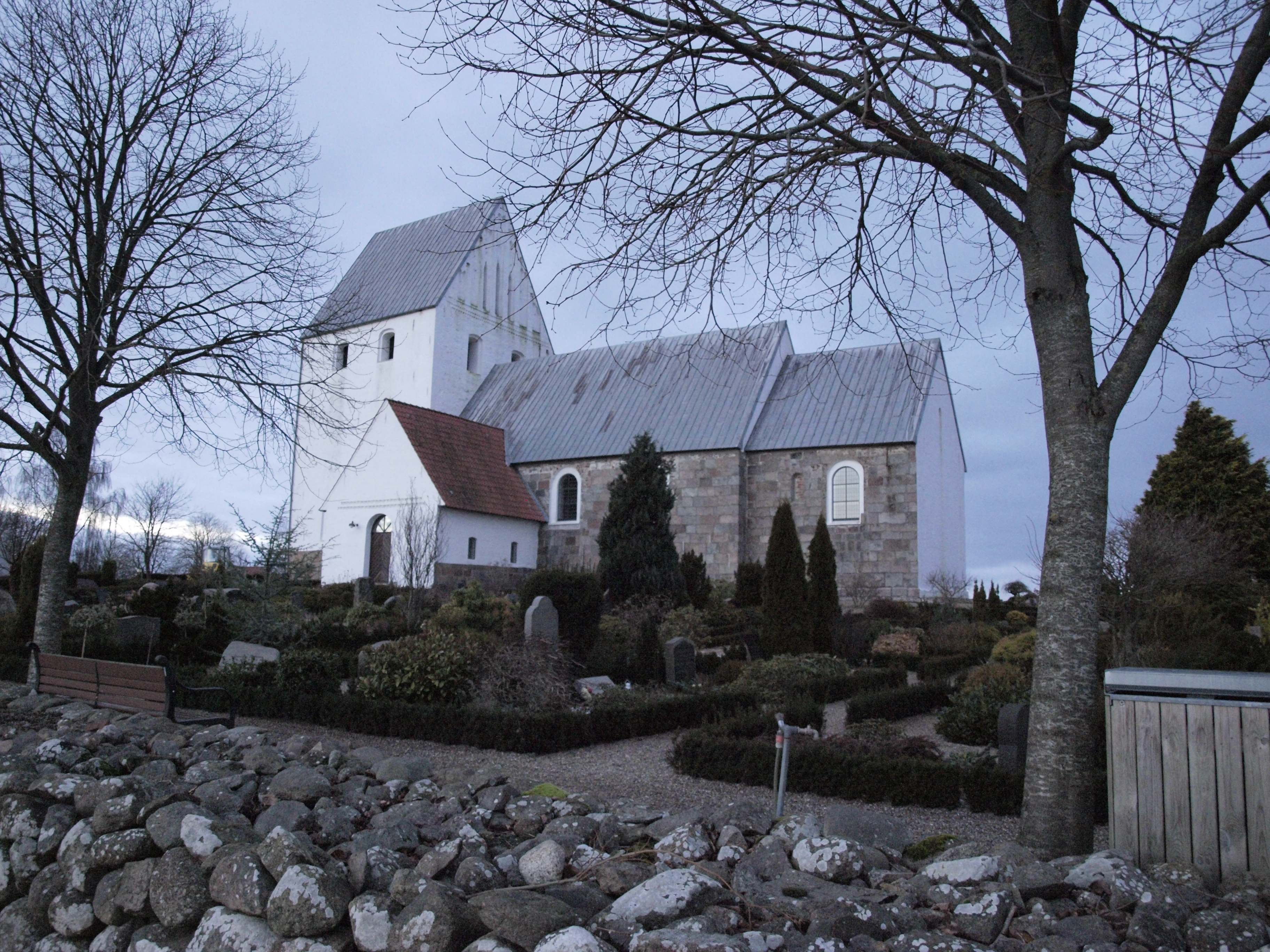 Lejrskov Kirke i januar 2017